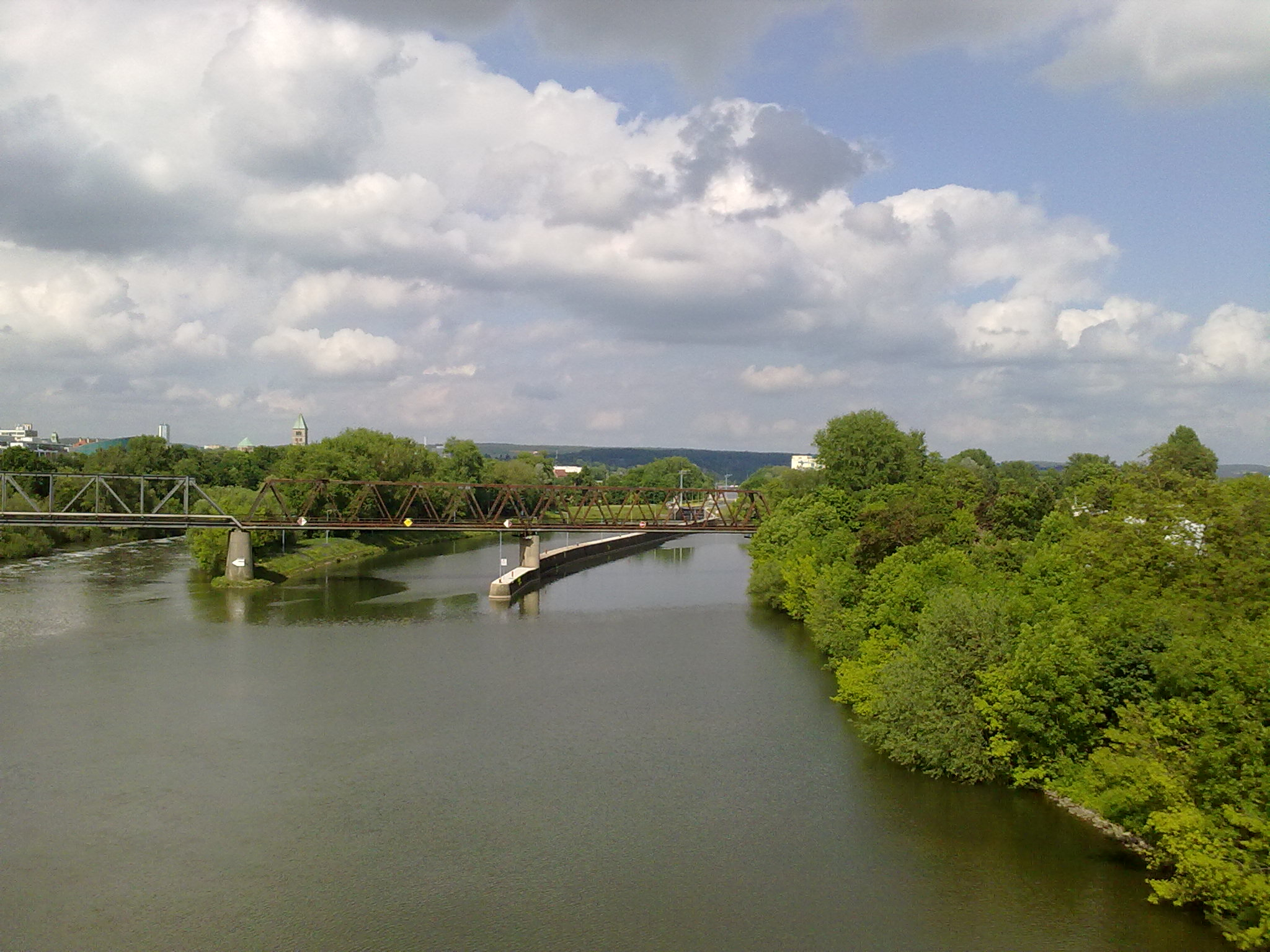 Main mit Schleuseneinfahrt